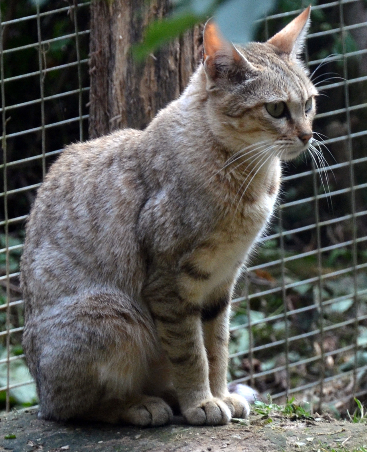 Chat de Gordoni (Felis silvestris gordoni) au Parc des Félins (Lumigny-Nesles-Ormeaux, 77, France).